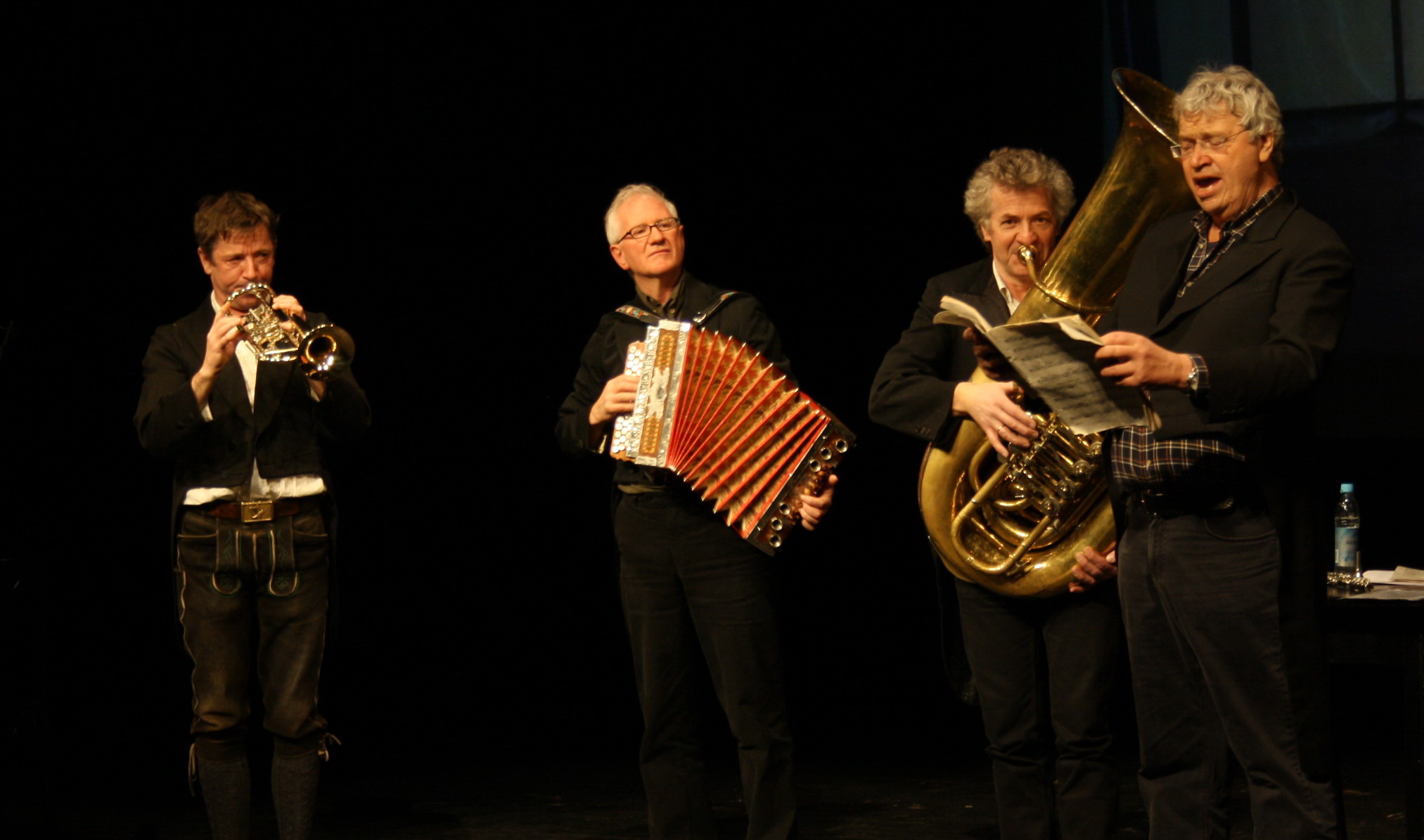 Gerhart Polt und die Biermösl Blosen im Volkstheater München bei der Verleihung des Großen Karl Valentin Preises an Fredl Fesl.